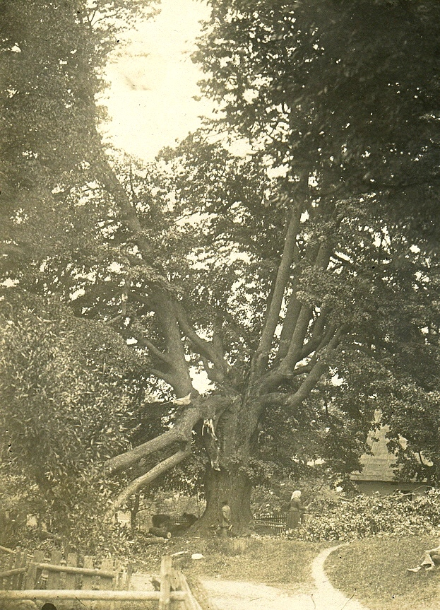 Lípa v Pusté Rybné po vylomení jedné z kosterních větví roku 1925